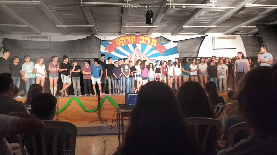 ערב קרקס בהפקת קבוצת ז